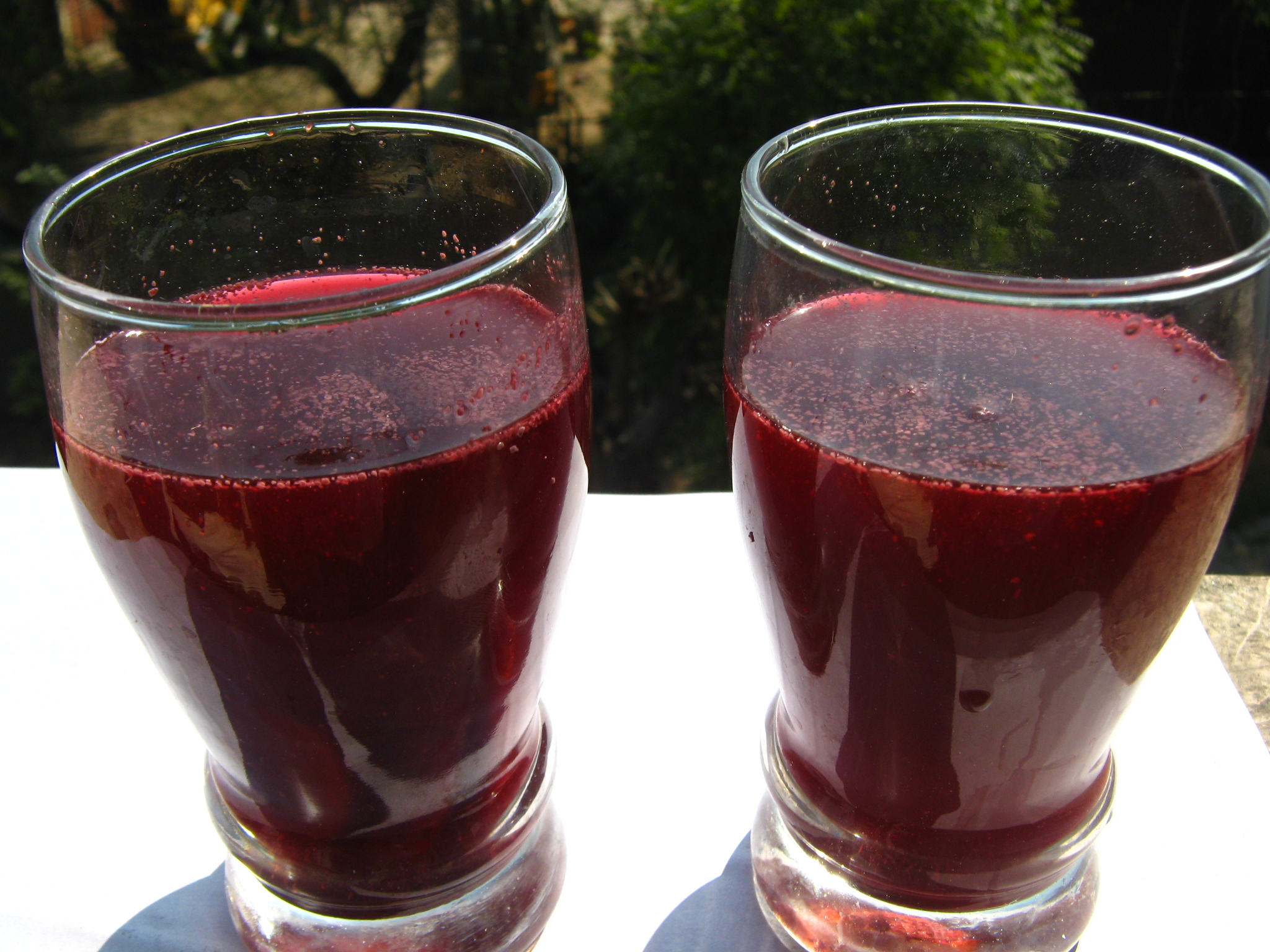 गाजर की कांजी